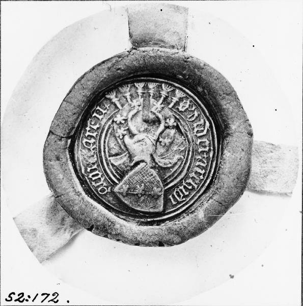 Sigill, Bengt Gustafsson, ärkedjäkne i Skara och electus 1449, R.A. pergament. Kategori: (11) Diverse Sigill, Bengt Gustafsson, ärkedjäkne i Skara och electus 1449, R.A. pergament.